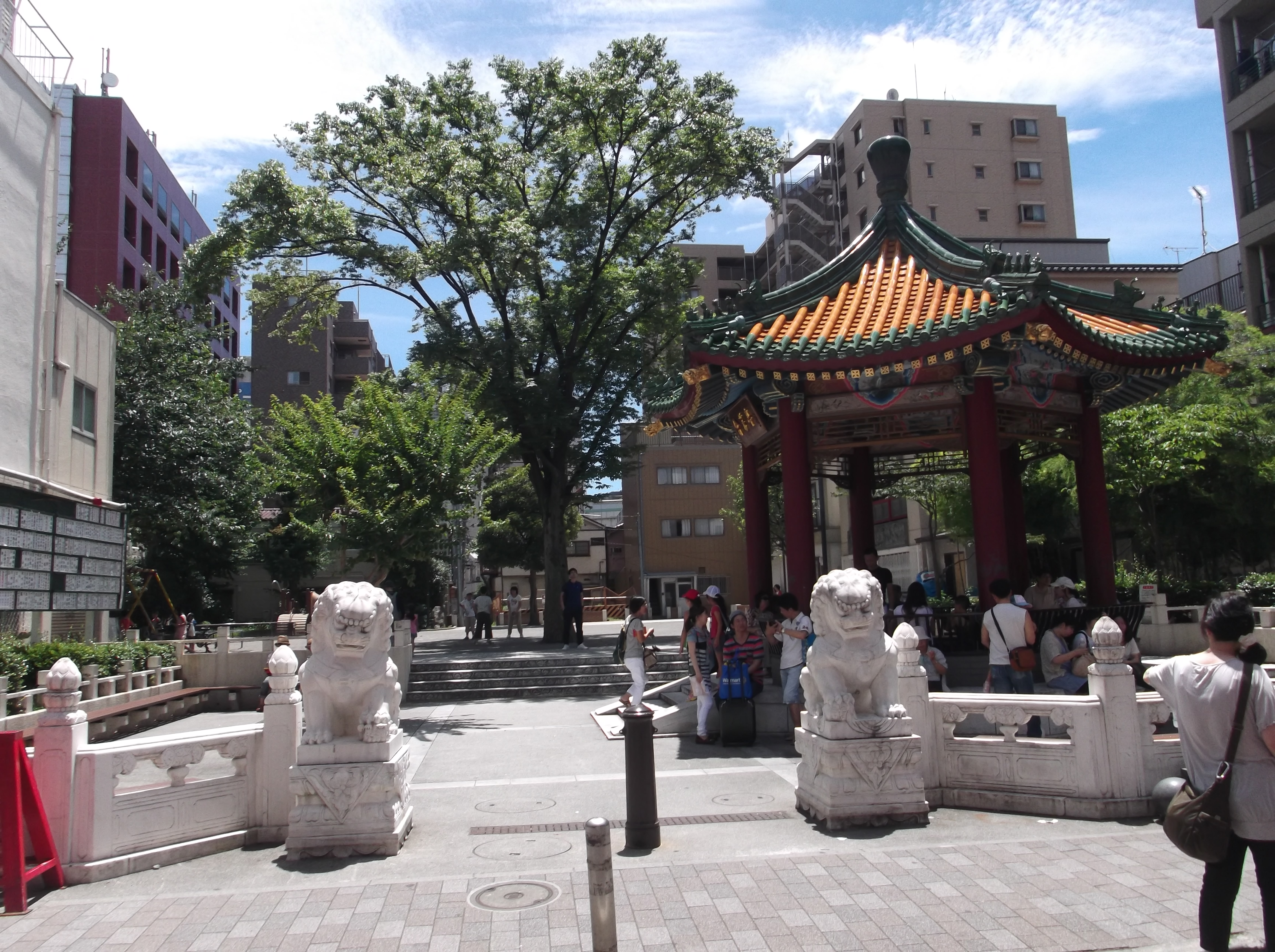 横浜市中区の横浜中華街の山下町公園、正面から。會芳亭が右に見える